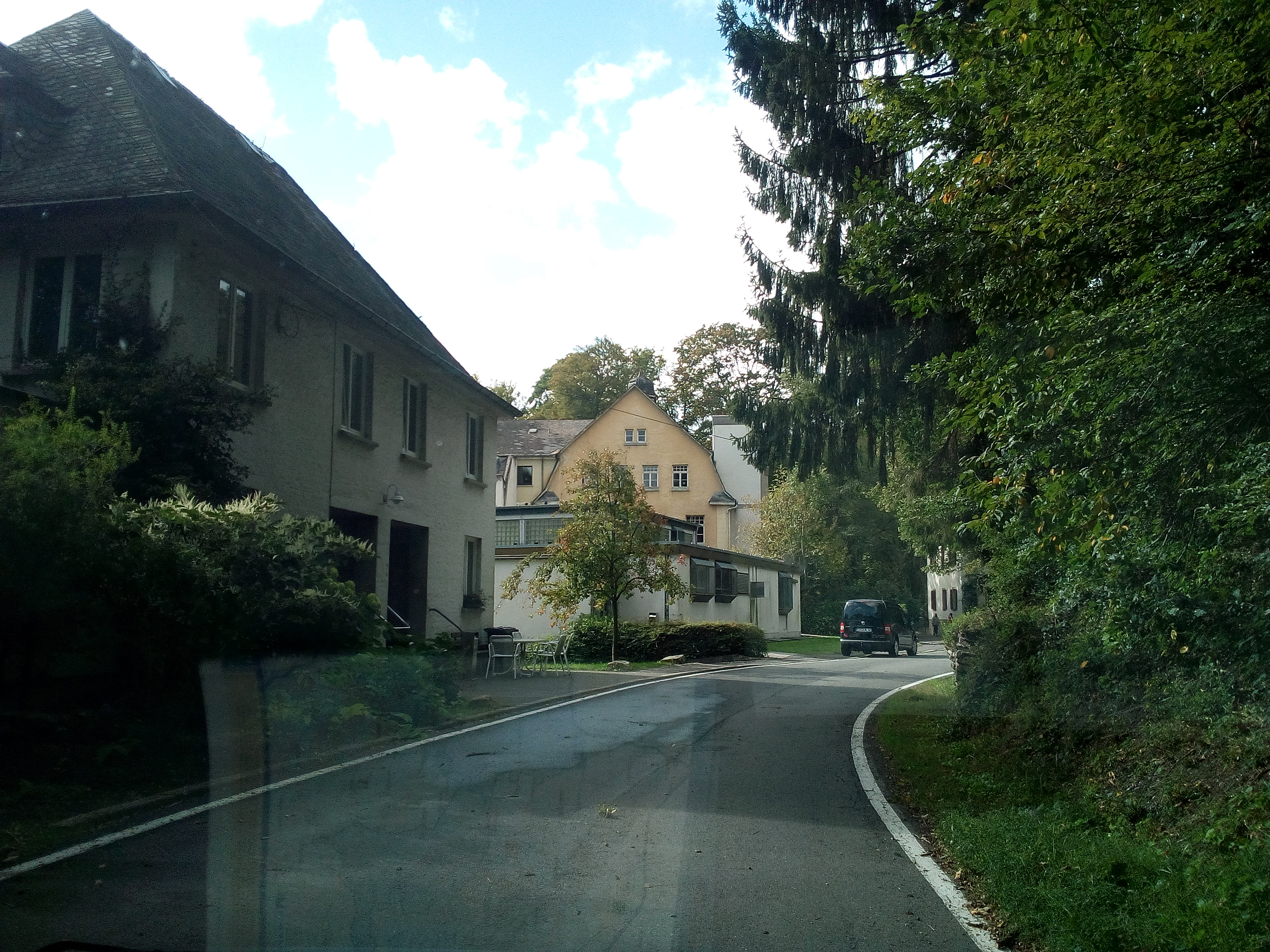 vom Werk zur Verhüttung und Weiterverarbeitung des Erzes (1721 bis 1872) zwei zu einer Zeile verbundene Wohn- und Verwaltungsgebäude, 18. Jahrhundert; daraus hervorgegangen Diakonieanstalt: Haus „Eben Ezer“ (Kopfbau mit abgewalmtem Mansarddach 1755, rückwärtiger Teil aus dem 18. Jahrhundert, im 19. Jahrhundert aufgestockt), Haus „Grüne Aue“ (villenartiger, asymmetrischer Bau, teilweise verputzt oder verschiefert, gegen 1907), Landschaftsgarten mit Einfriedung und Lauf des Asbaches, 19. Jahrhundert